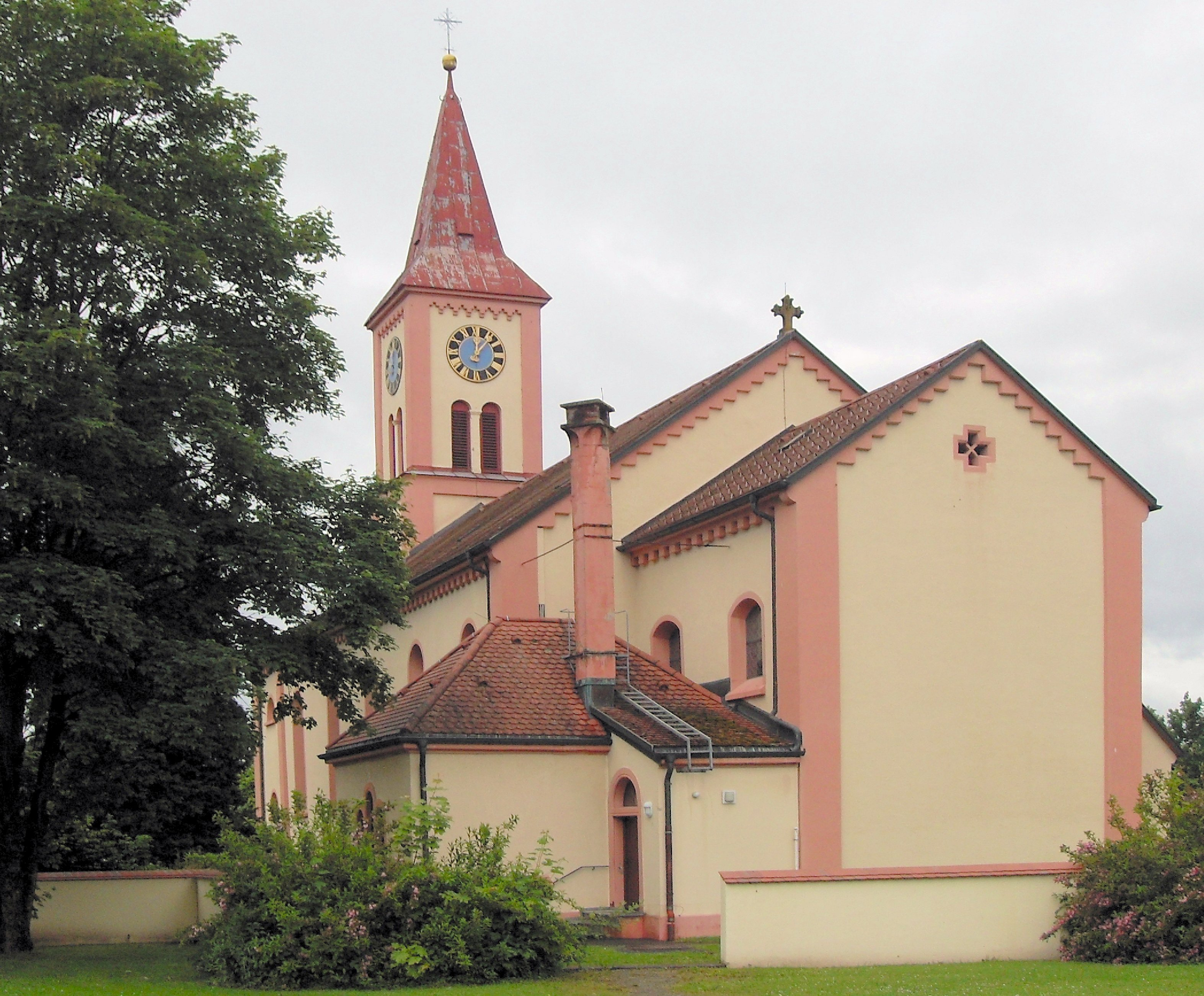 Kirche St. Clemens in Lauchringen